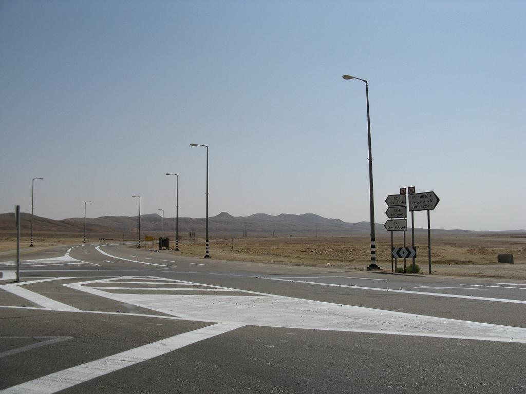 צומת ציחור, אי שם בסוף העולם